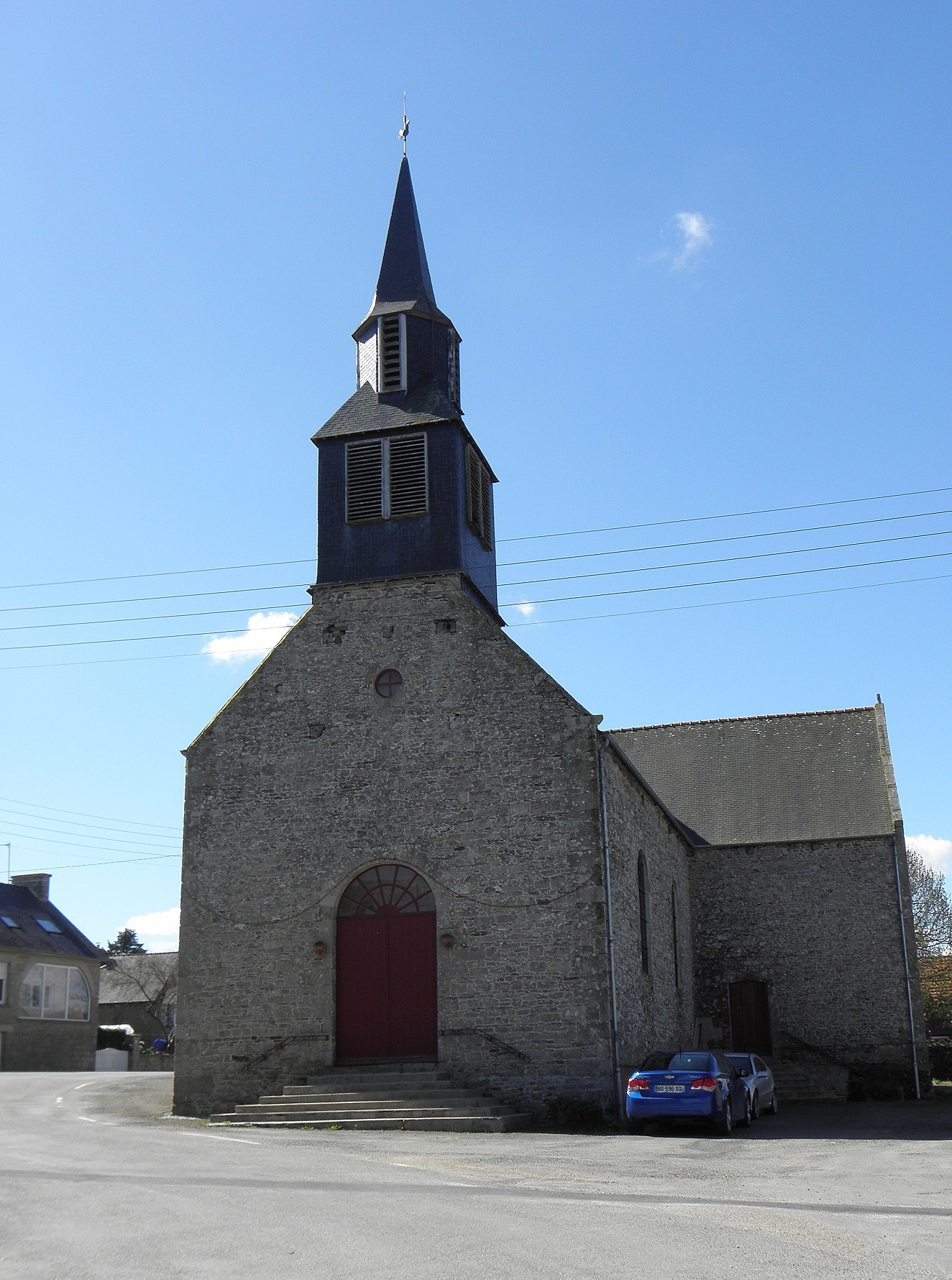 Église Saint-Pierre de Trédias (22). Façade principale.